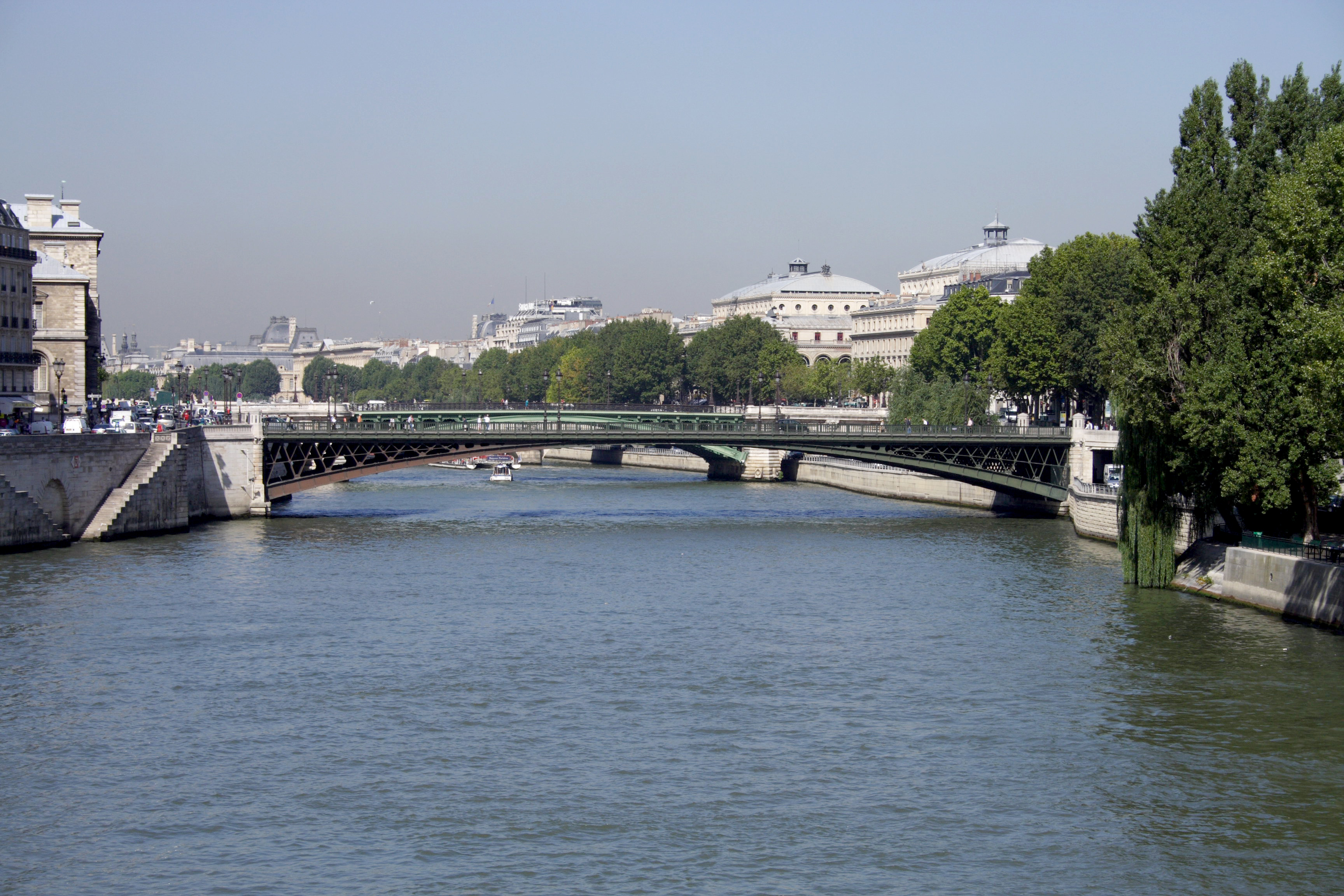 Pont d'Arcole(Paris, France)